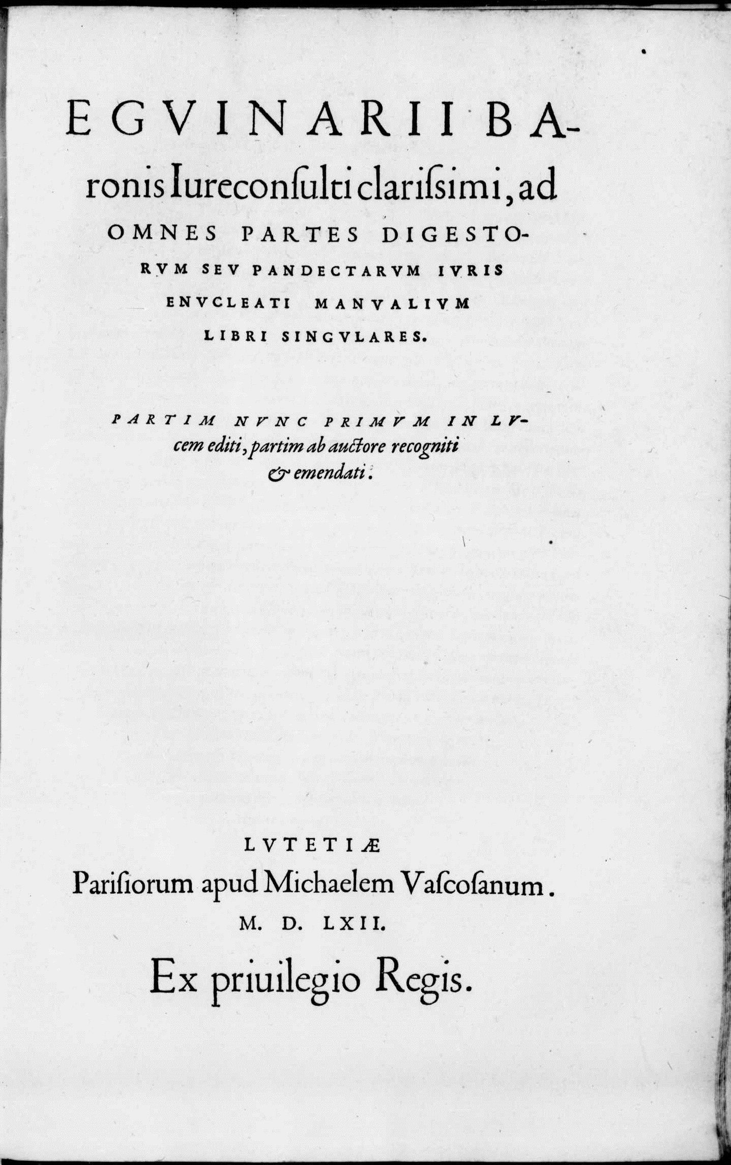 Frontespizio